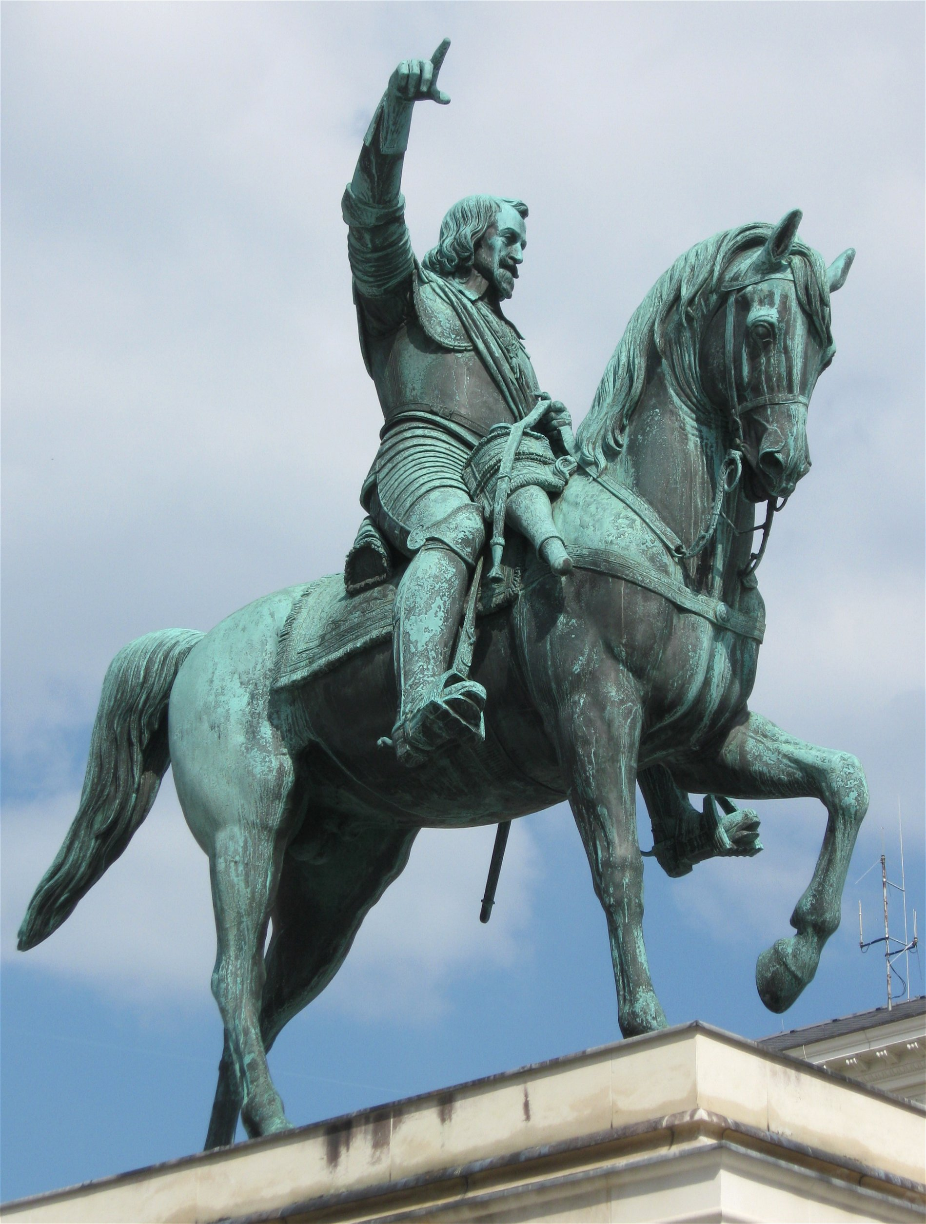 Wittelsbacherplatz; Reiterstandbild des Kurfürsten Maximilian I., überlebensgroße Bronzeplastik auf Granitmarmorsockel, von Bertel Thorwaldsen und Leo von Klenze, 1839.